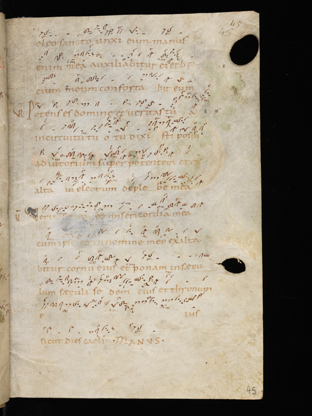 Cod. Eins. 121, Neumen und Litterae Significativae, S. 45